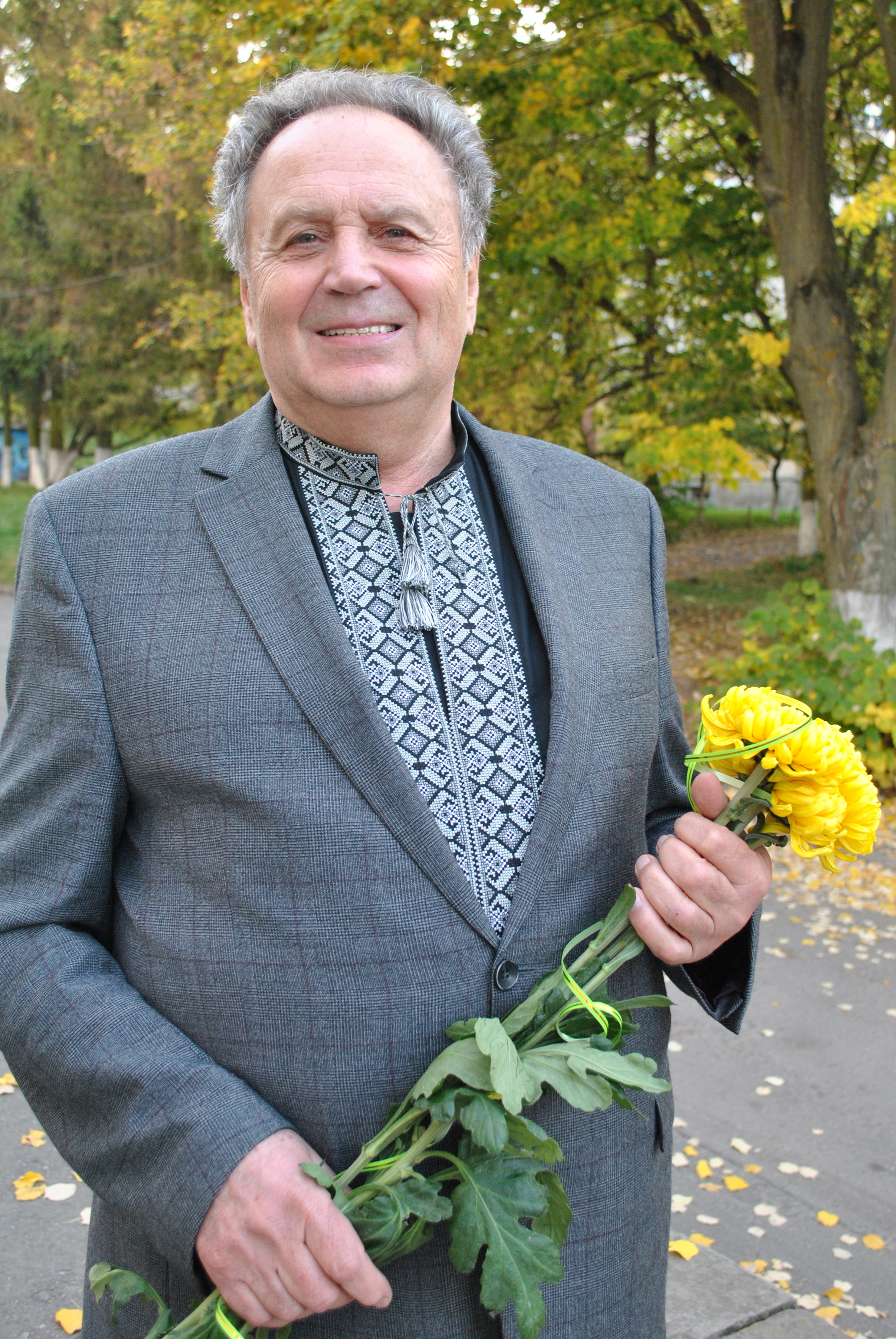 Український діяч культури, диригент, заслужений артист України Іваноньків Богдан Михайлович.